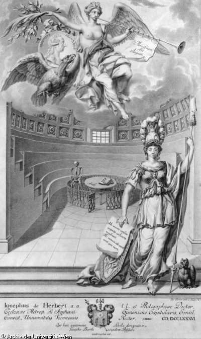 Anatomisches Theater der Universität Wien im Aulagebäude